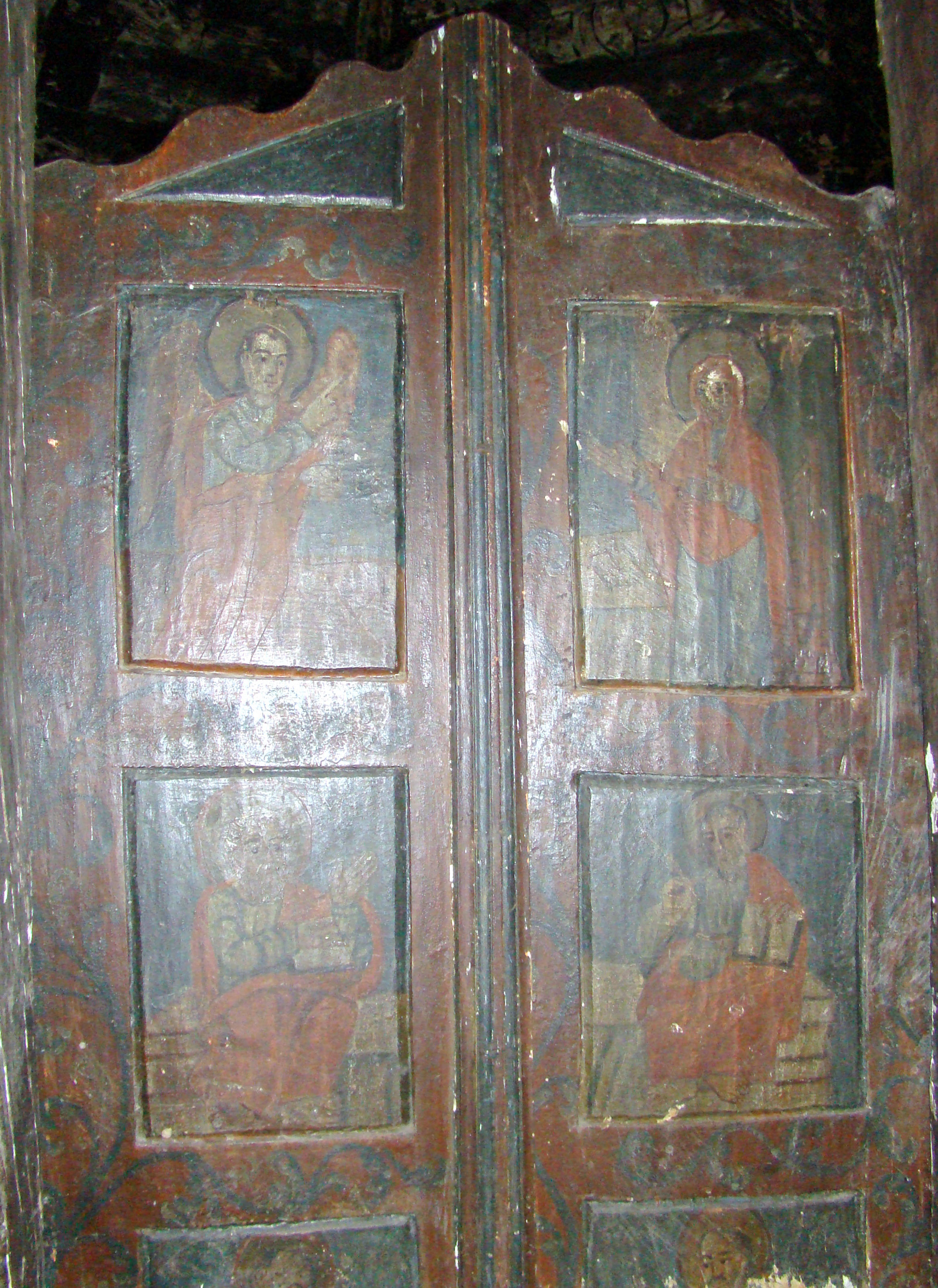 Biserica de lemn din Apahida, județul Cluj